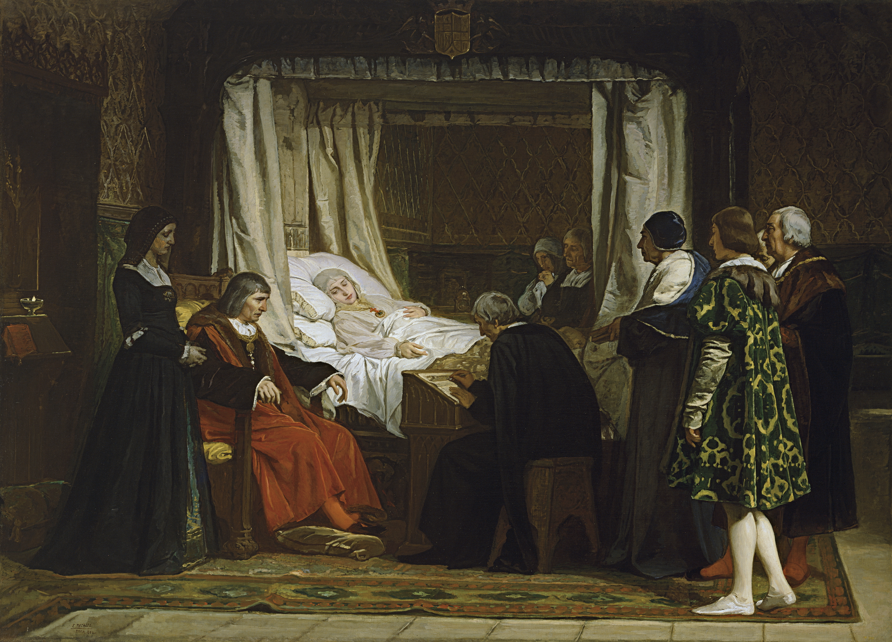 El lienzo representa a la reina Isabel I de Castilla, que falleció en Medina del Campo en 1504, dictando su testamento en presencia de su esposo, Fernando II de Aragón, y de otros personajes de la Corte castellana.